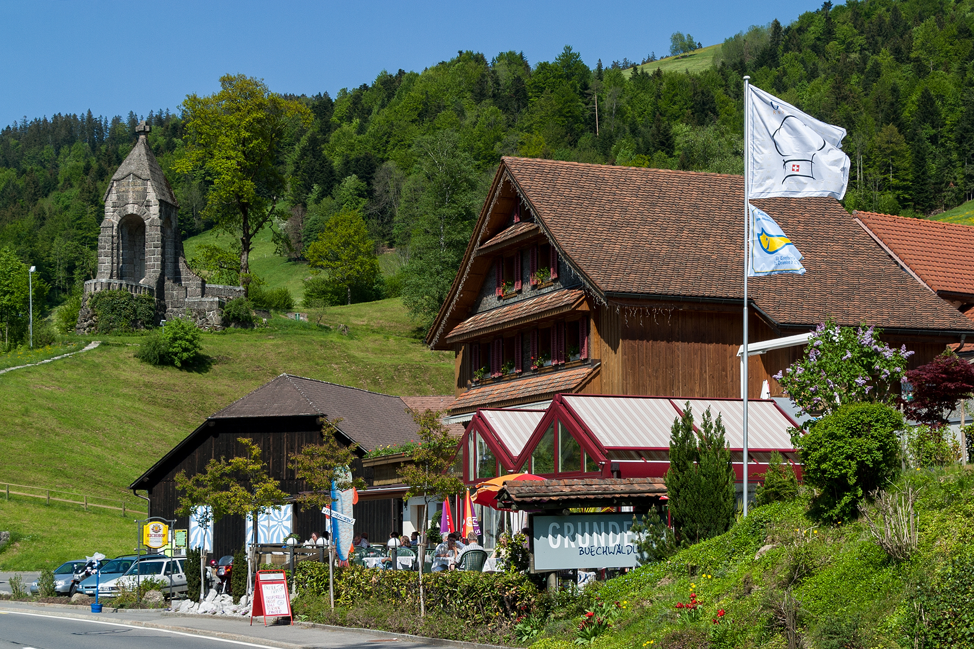 Schlachtenkmal und Restaurant in Morgarten